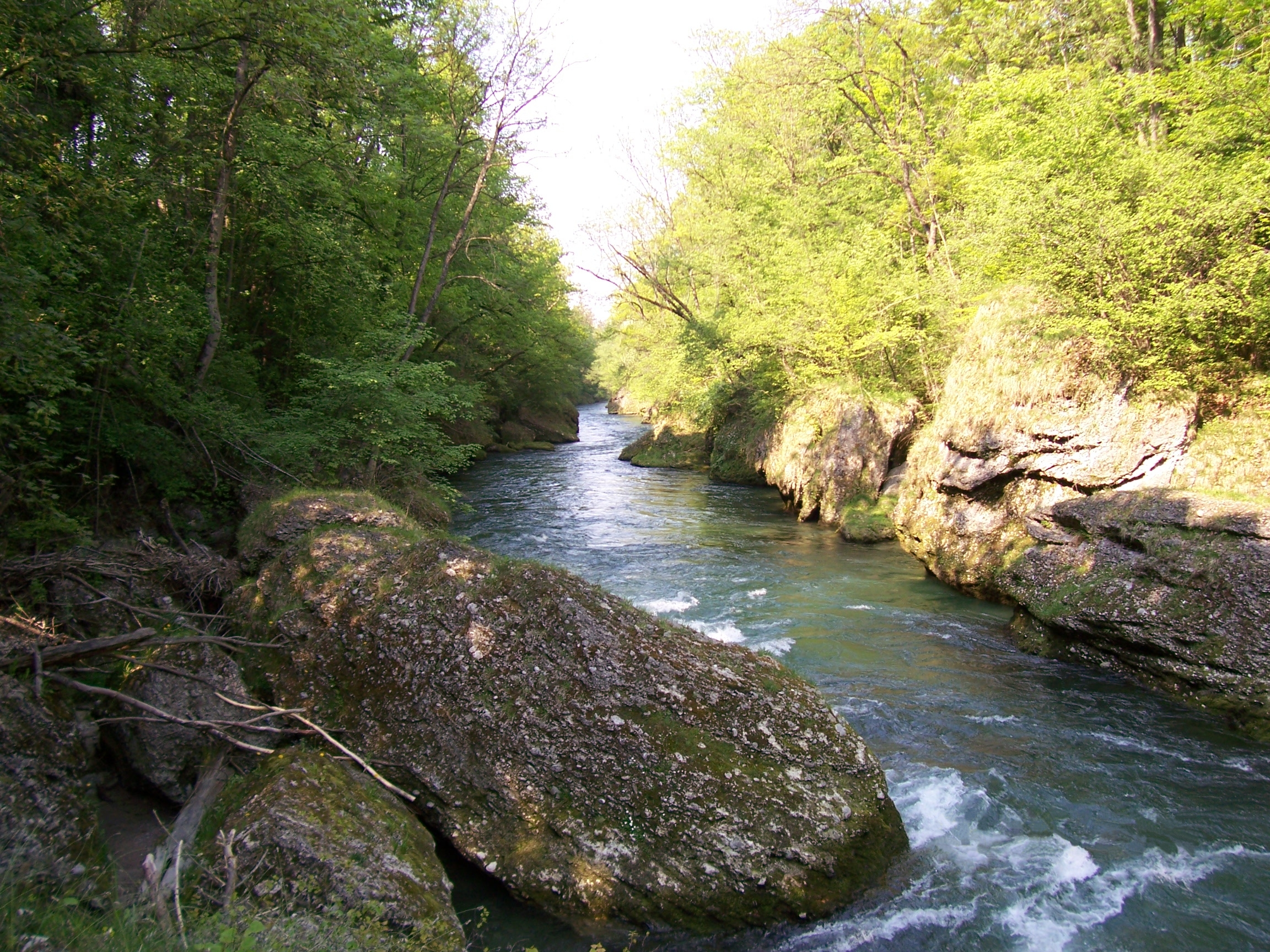 Große Erlauf in Purgstall/E.(Österreich/Niederösterreich/Bezirk Scheibbs) Erlaufschlucht Kamera: Kodak C663